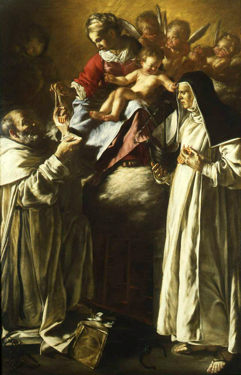 La Madonna porge l'insegna dell'Ordine dei Mercedari a san Pietro Nolasco (opera detta anche Pala dei Mercedari)